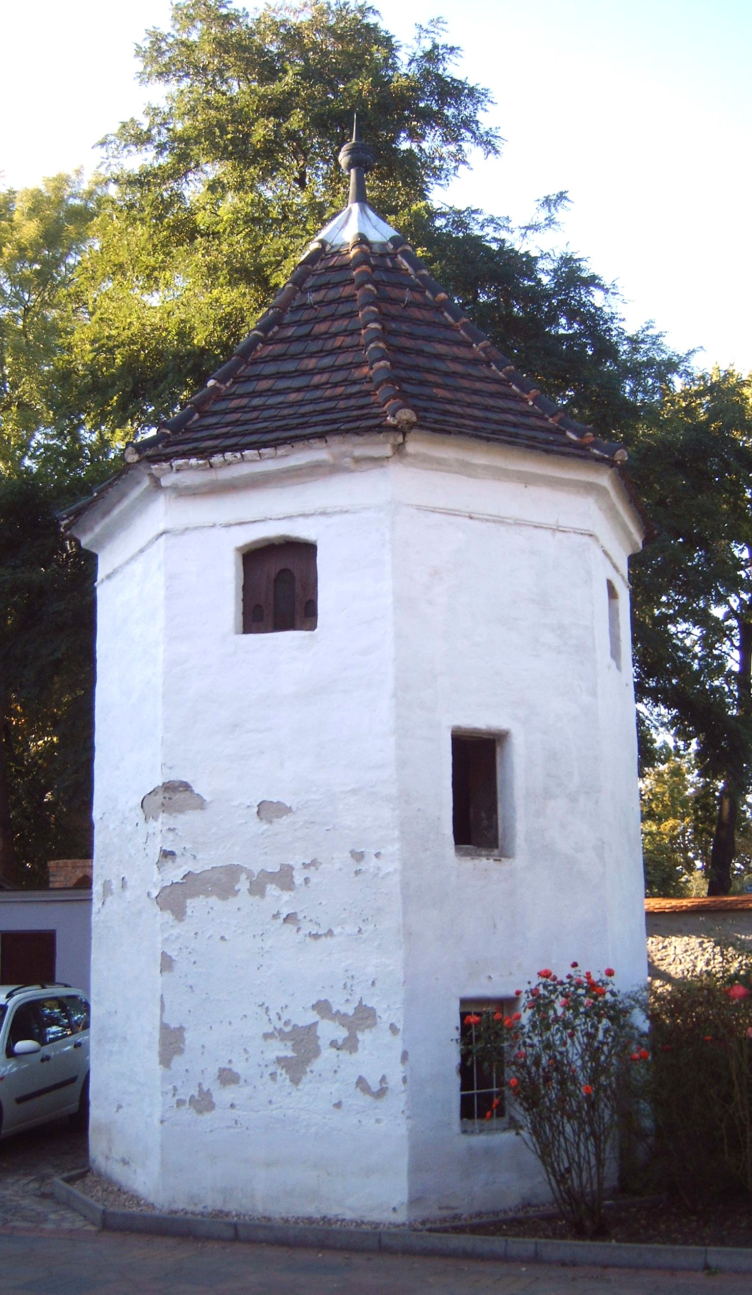 Taubenturm in Salbke, Magdeburg, Sachsen-Anhalt